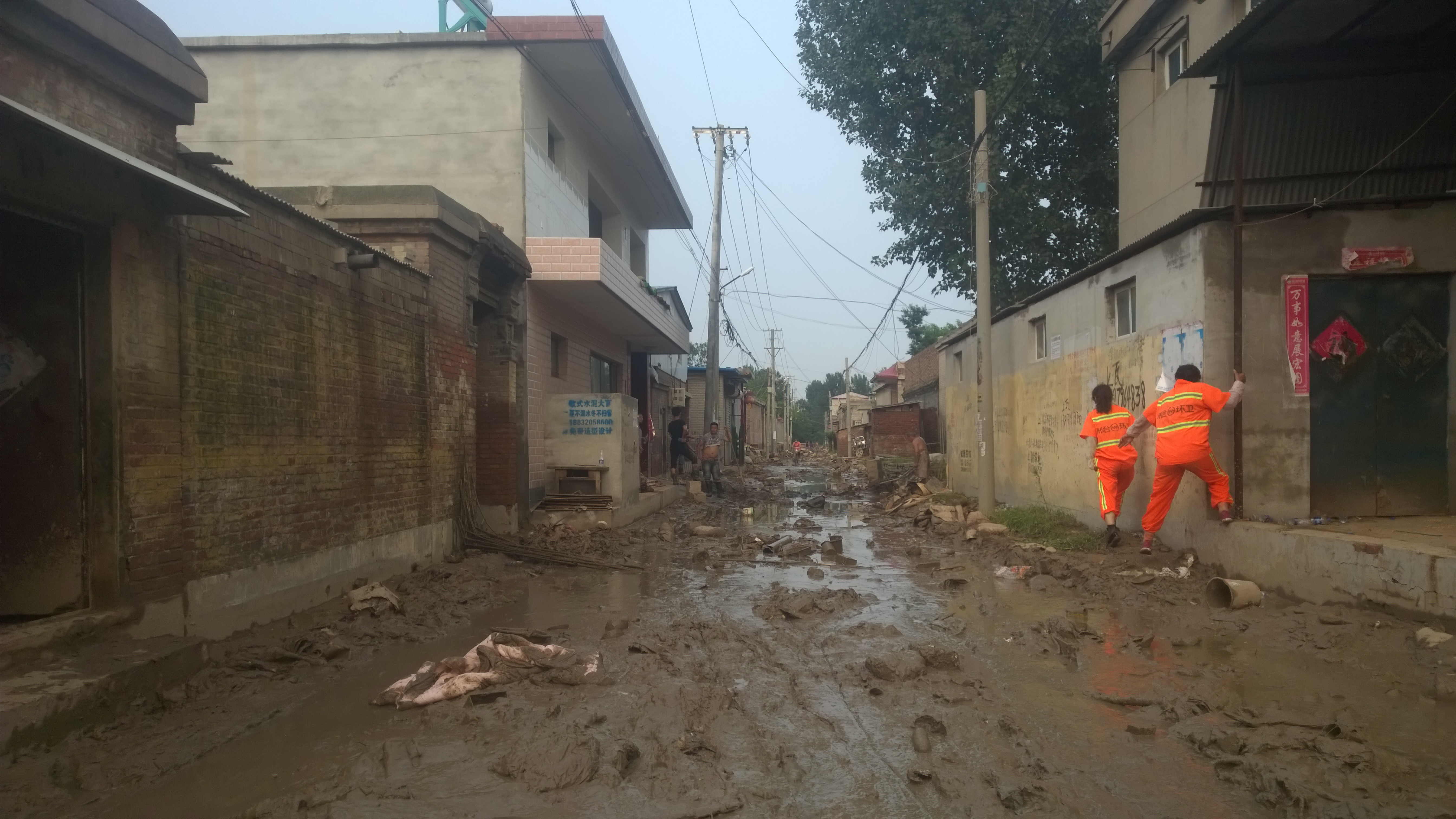 2016年邢台洪灾